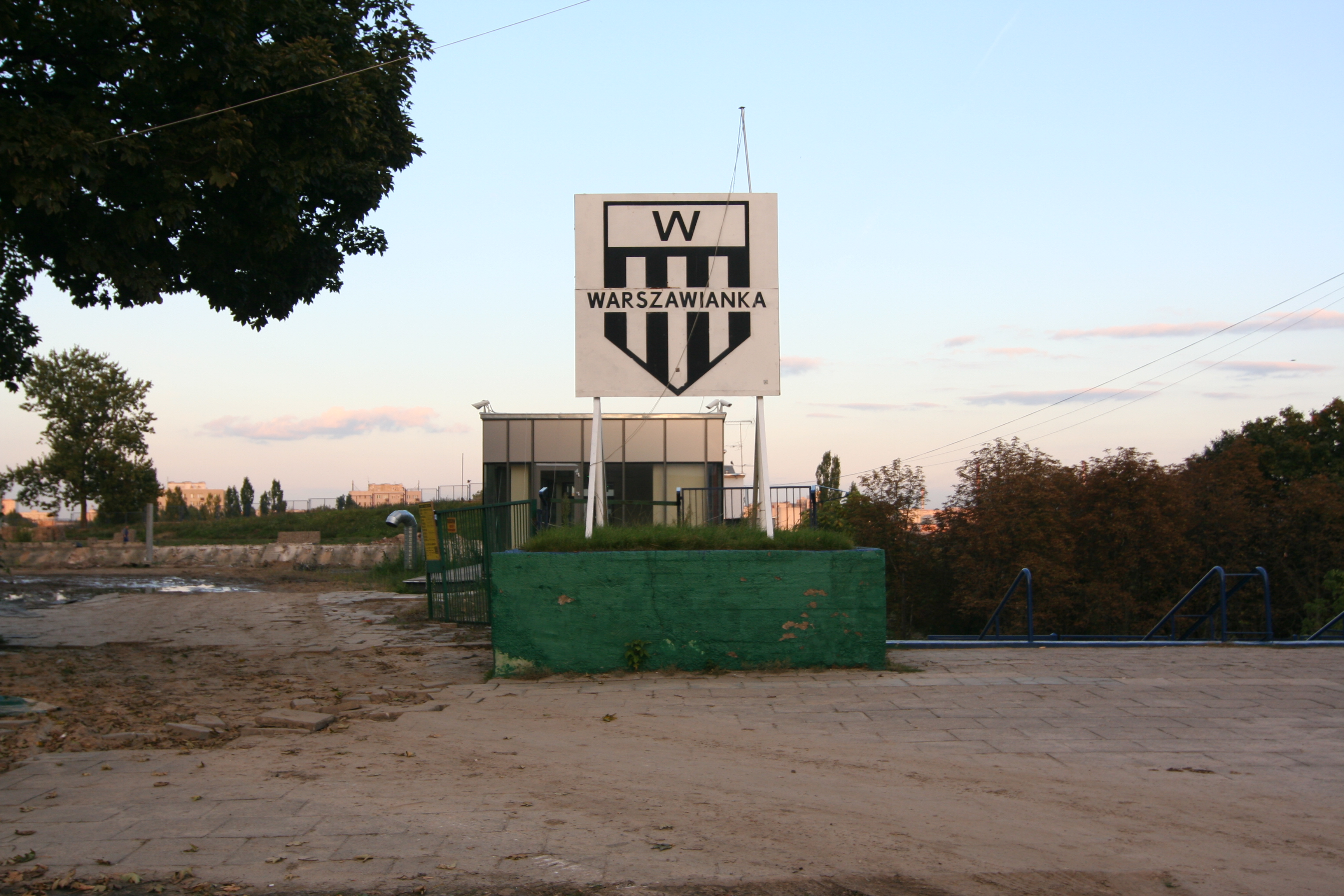 Warszawianka